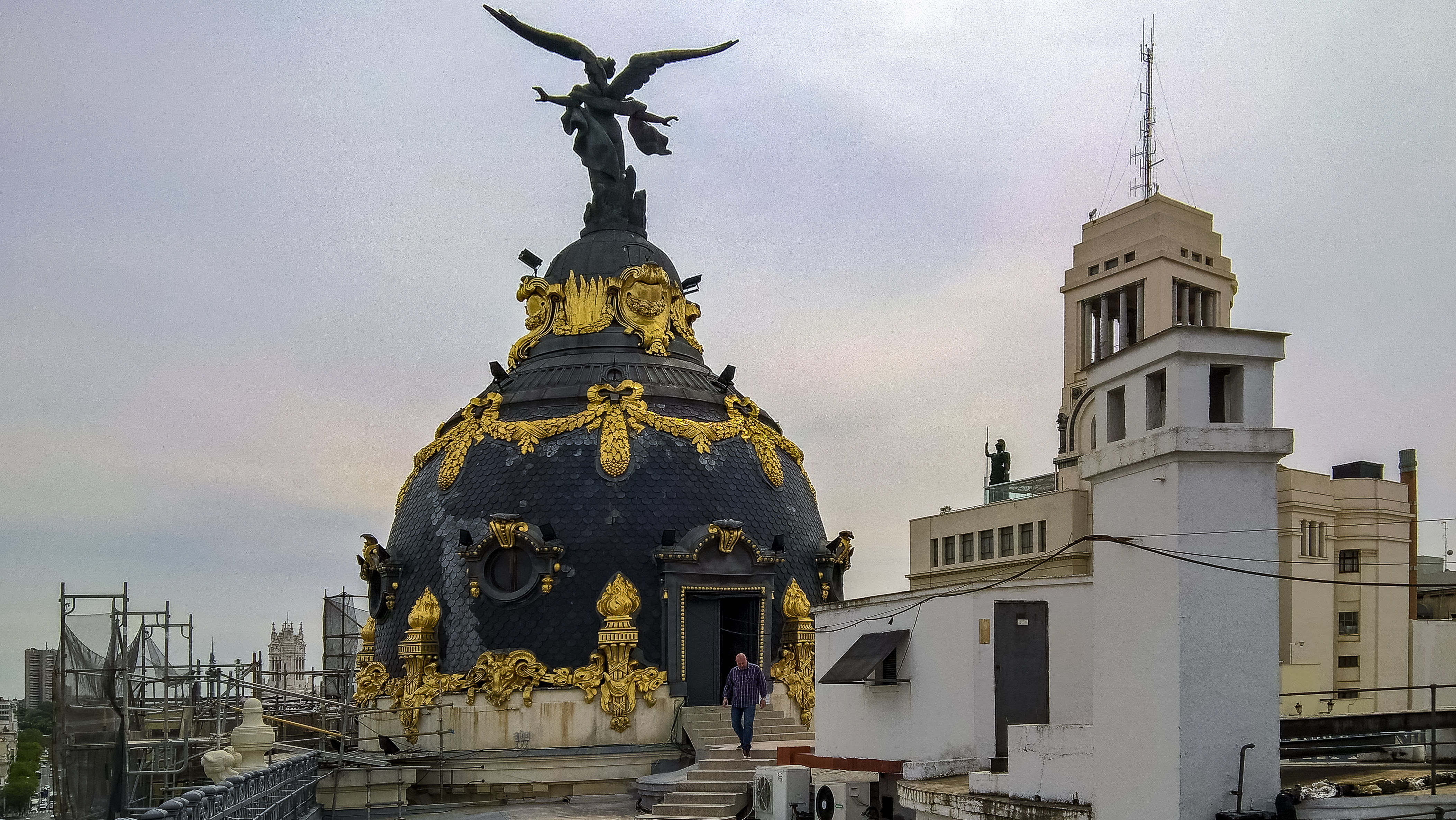 Cúpula do edificio Metrópolis en Madrid no 2016 (En reforma) vista desde a propia terraza